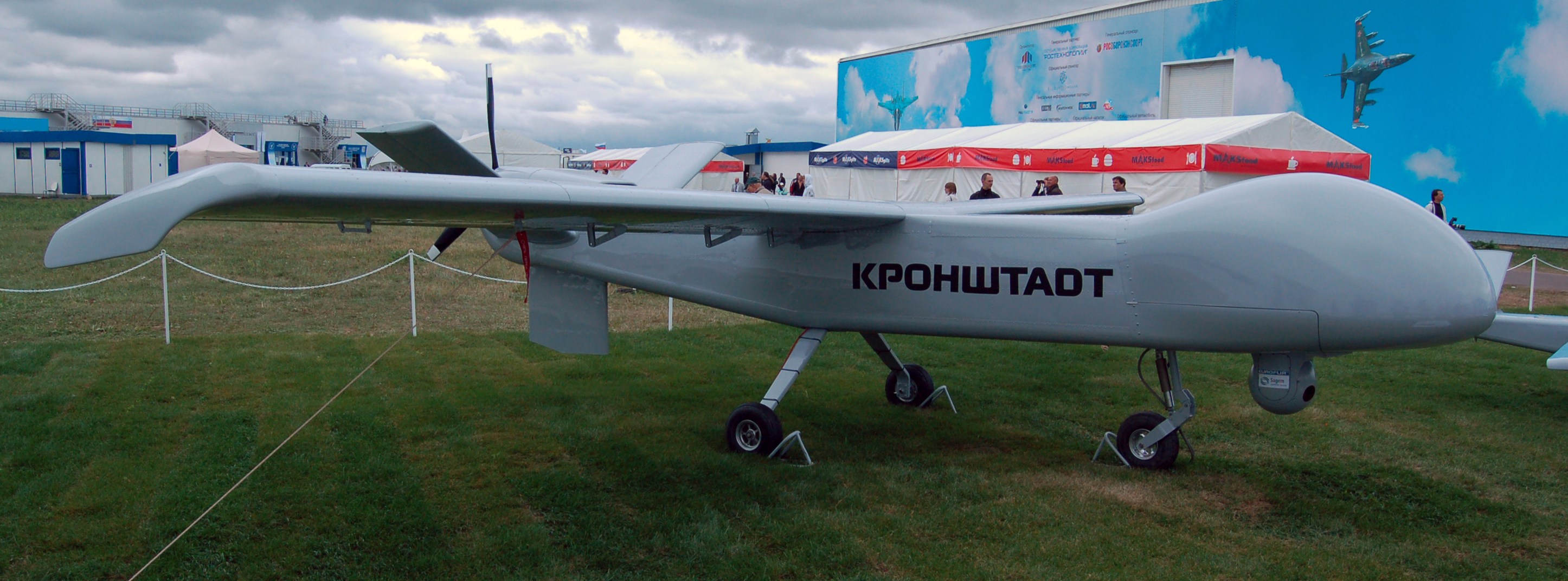 Беспилотный многоцелевой самолёт Дозор-600. МАКС-2009